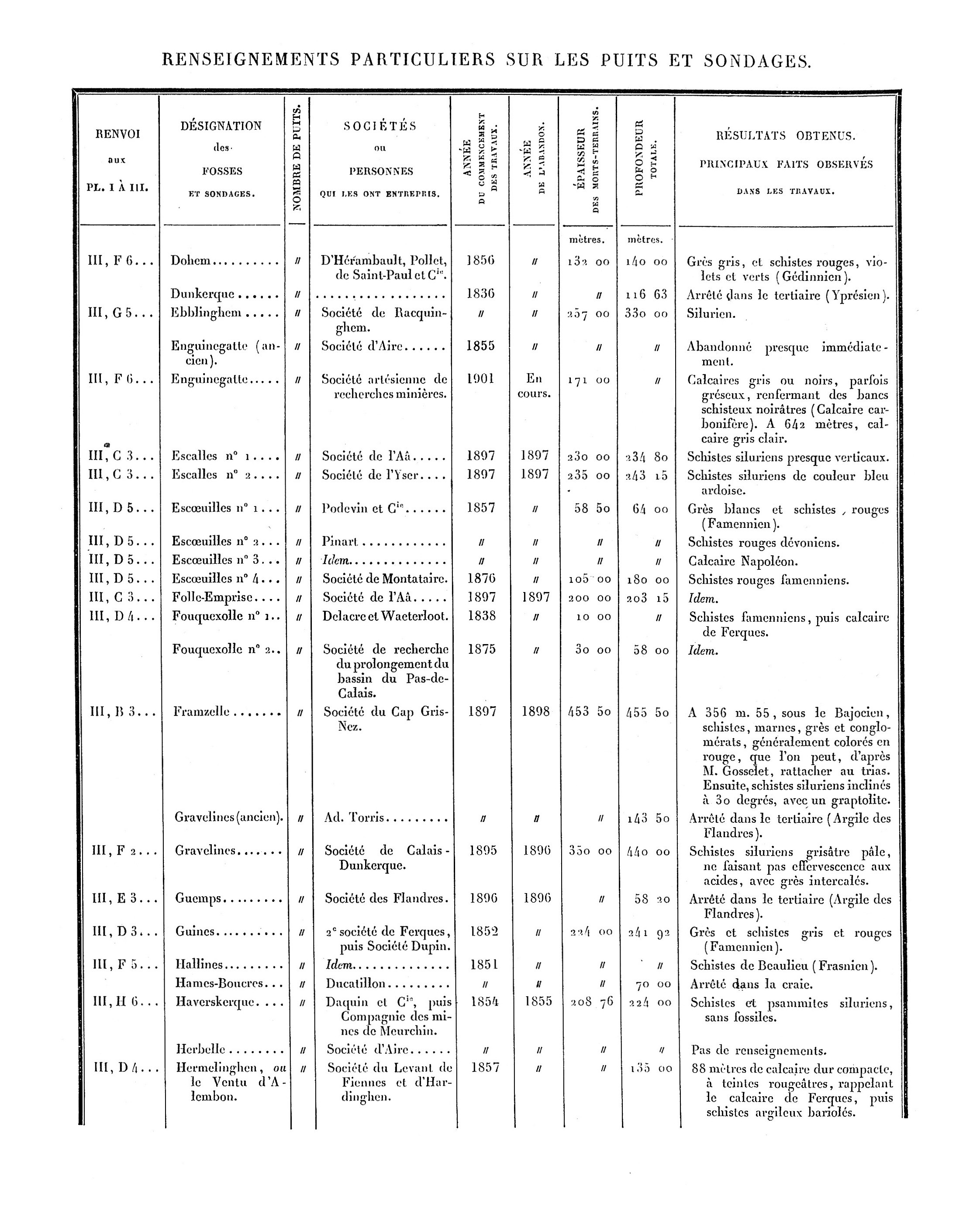 Liste des puits de mine et des sondages. Mines du Boulonnais. Document extrait de Étude des Gîtes Minéraux de la France. Topographie Souterraine du Bassin Houiller du Boulonnais ou Bassin d'Hardinghen, par A. Olry, ingénieur en chef des Mines. Chapitre IX, pages 172 à 189.